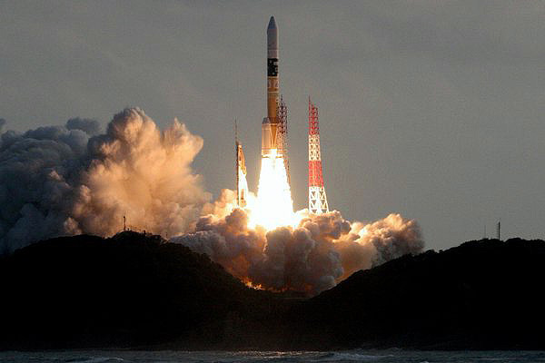 鹿児島県南種子町より打ち上げられるH-IIA F29ロケット